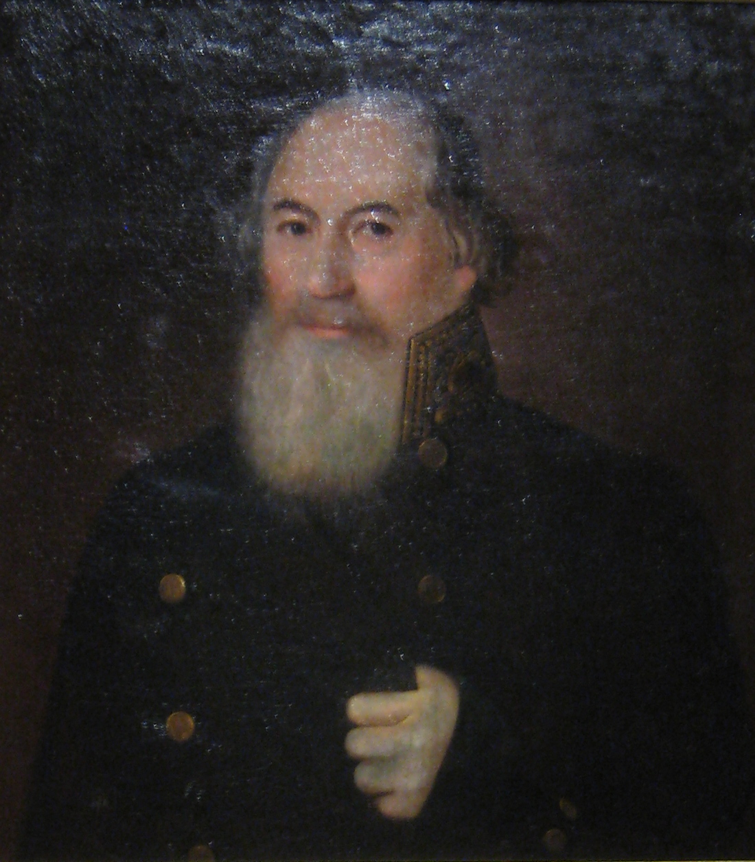 Антипа Дмитриевич Шелапутин (1779/1789—1852/1851) — московский 1-й гильдии купец, коммерции советник, почетный гражданин, старообрядческий деятель (позднее получил звание коммерции советника). В 1812 году владел крупной шелковой фабрикой на Яузе. Одним из первых по призыву императора Александра I внес пожертвование на борьбу с неприятелем. Музей "Бородинская панорама"